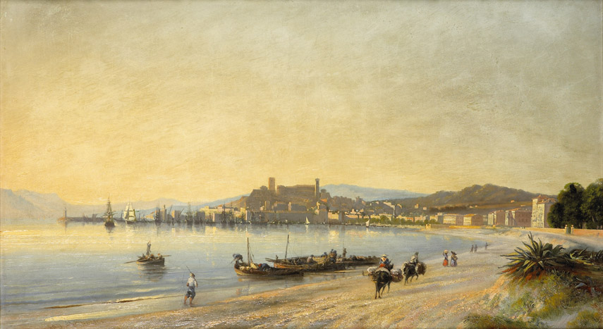 Vue de Cannes